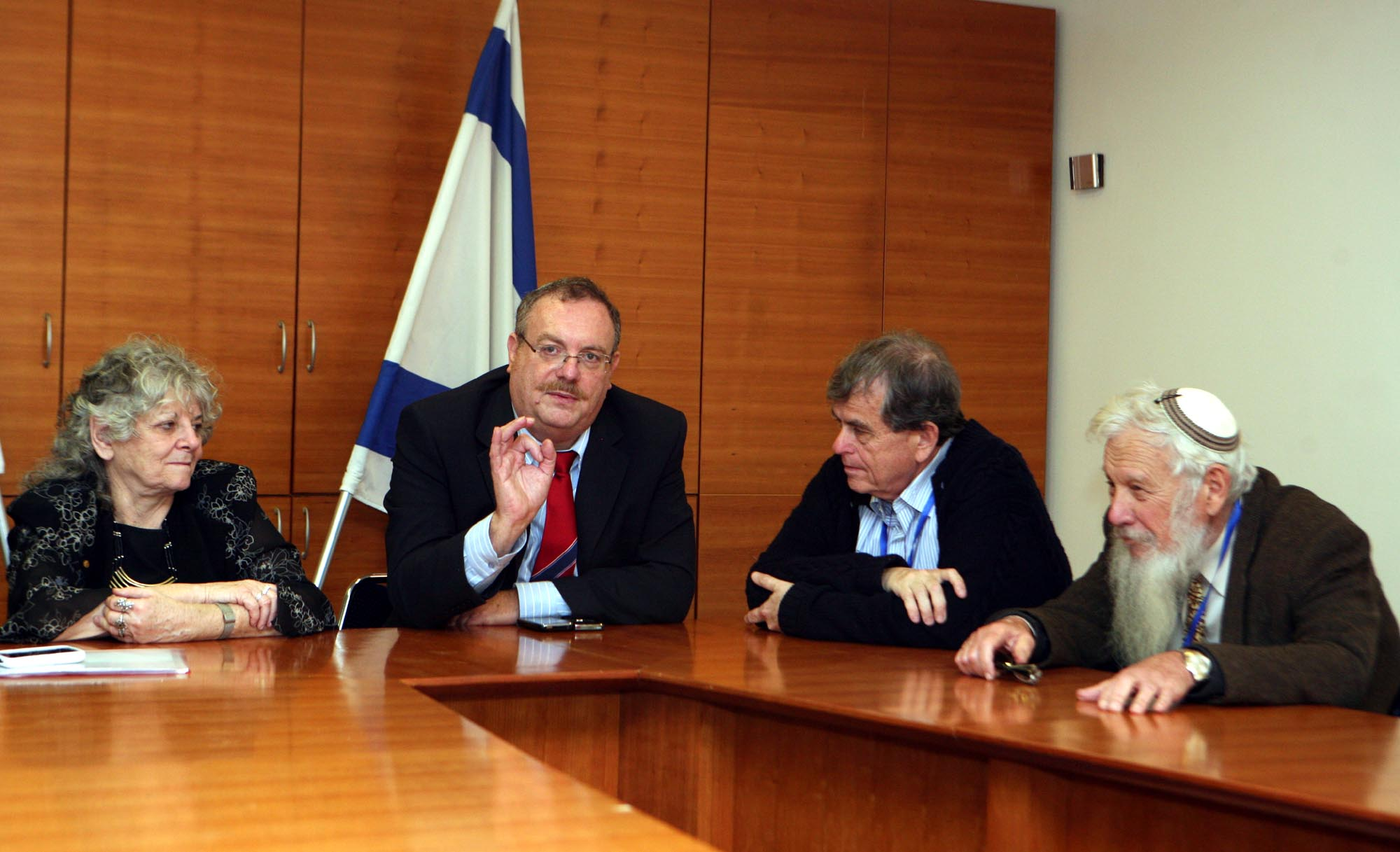 הרשקוביץ עם הפרופסורים אומן, צ'חנובר ויונת